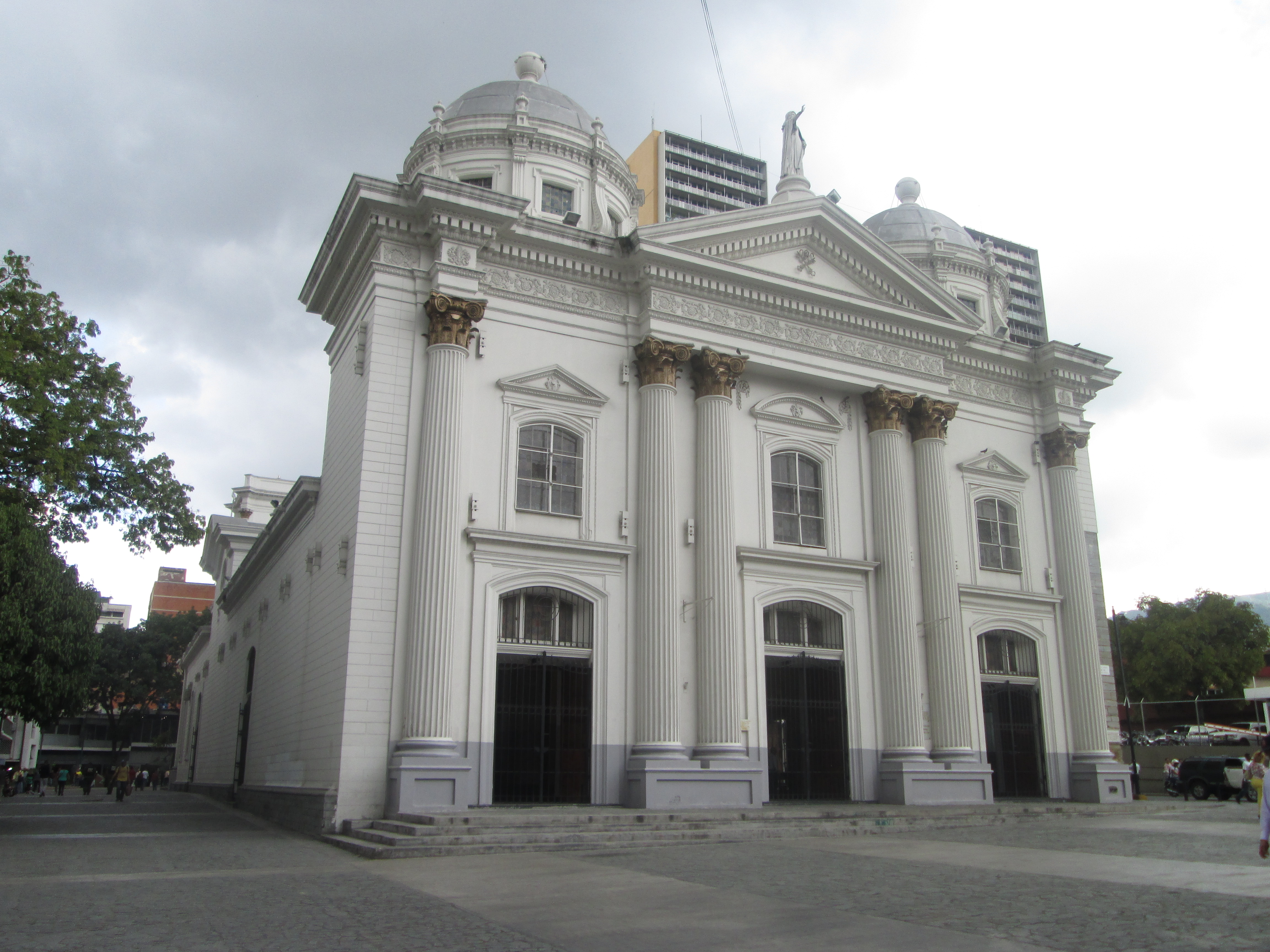 Parte Trasera de la Basílica de Santa Teresa